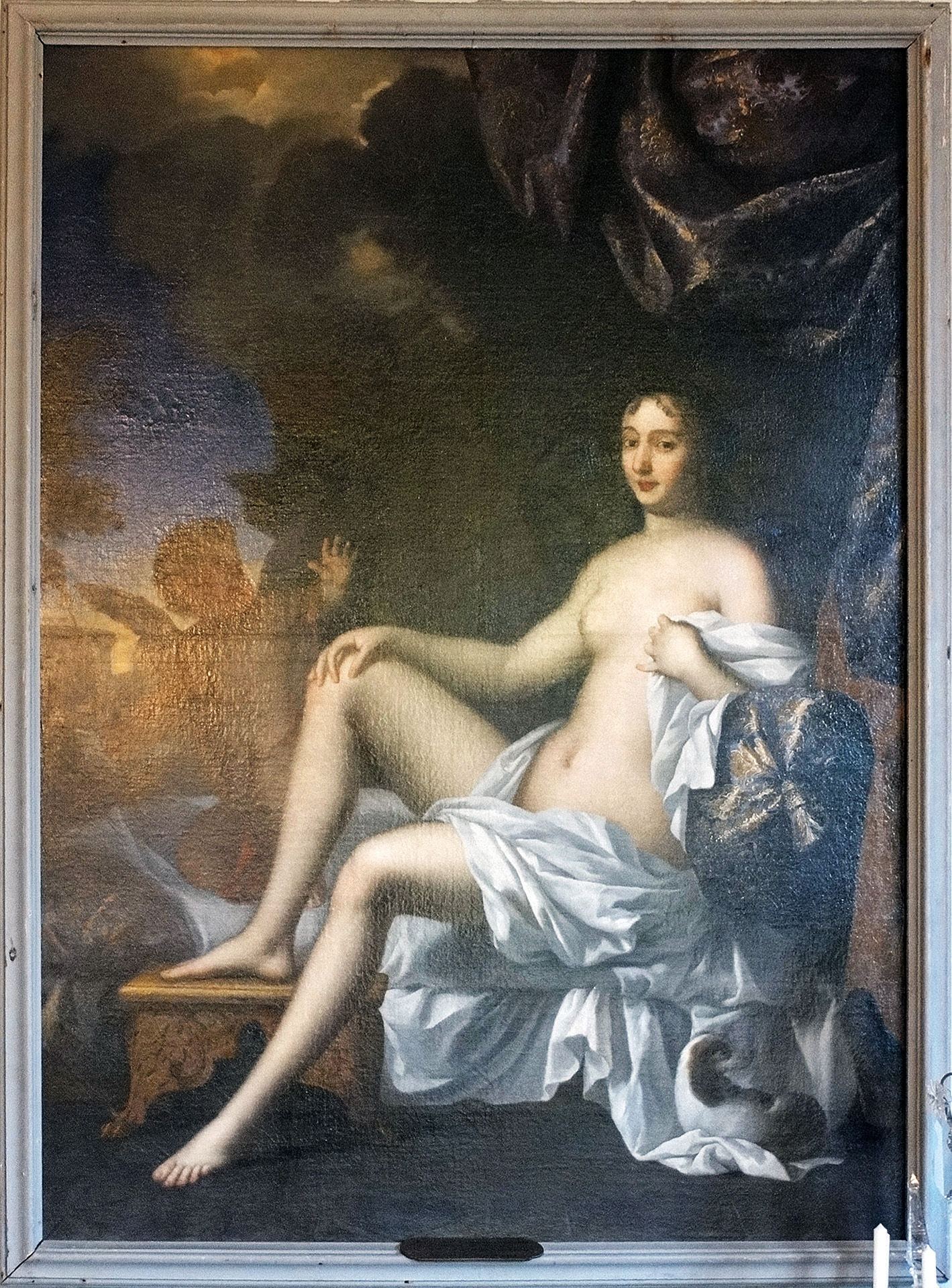 Portrait de Françoise Scarron peint par Louis de Mornay. Salle à manger du château du Haut. Domaine de Villarceaux, Chaussy, Val-d'Oise, France.